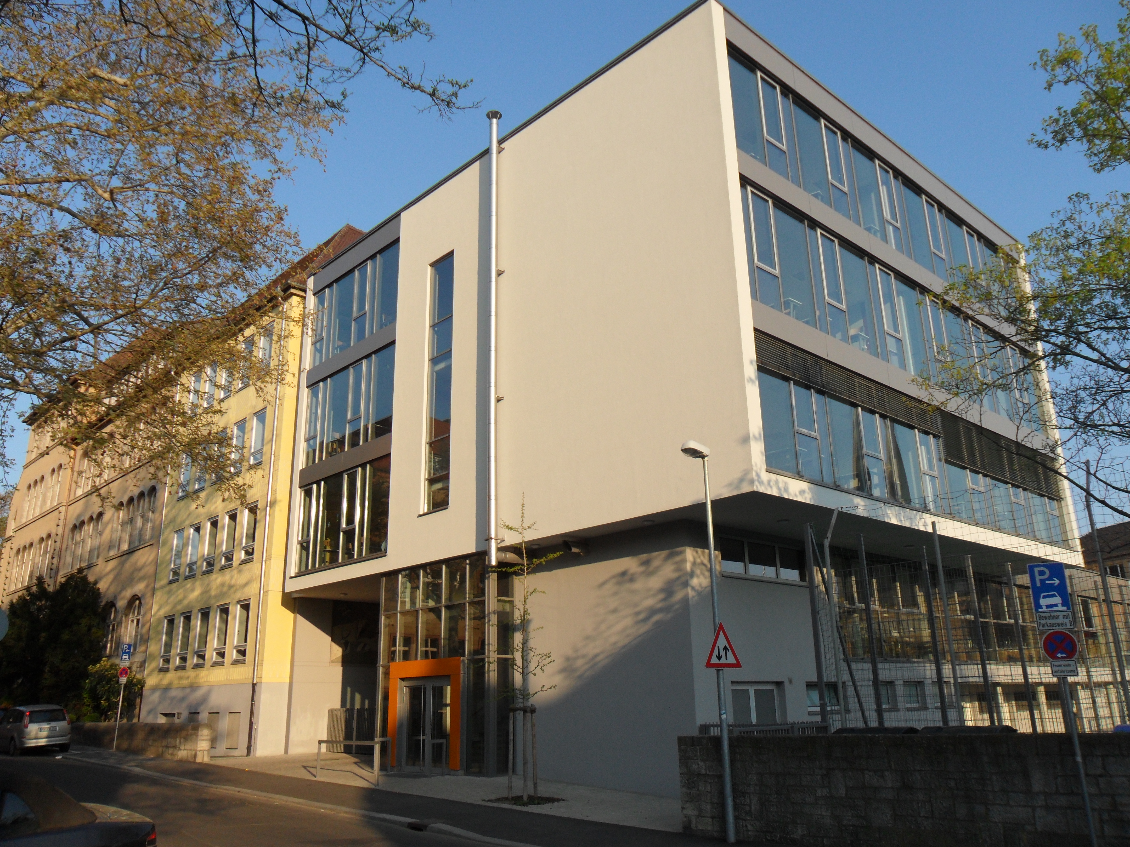 Siebold-Gymnasium, Rennweger Ring 11, Würzburg